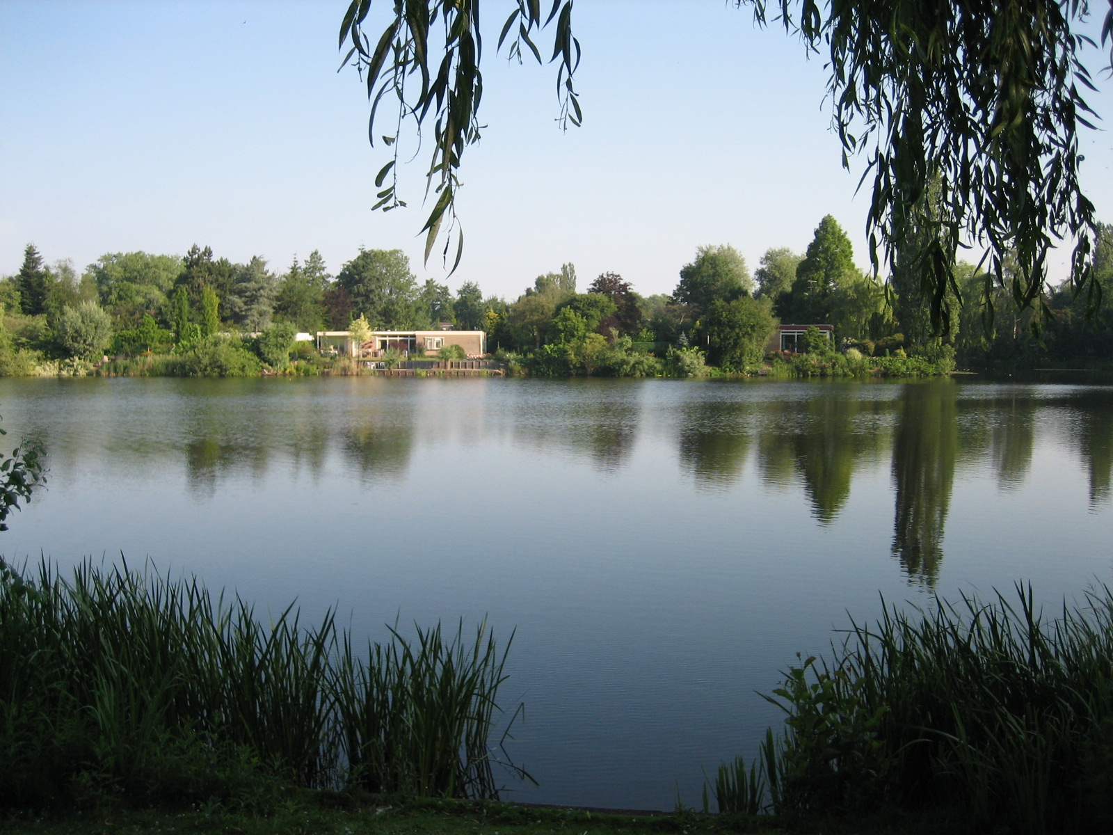 De Nieuwleusener Hulsterplas in Nieuwleusen (Overijssel, Nederland)